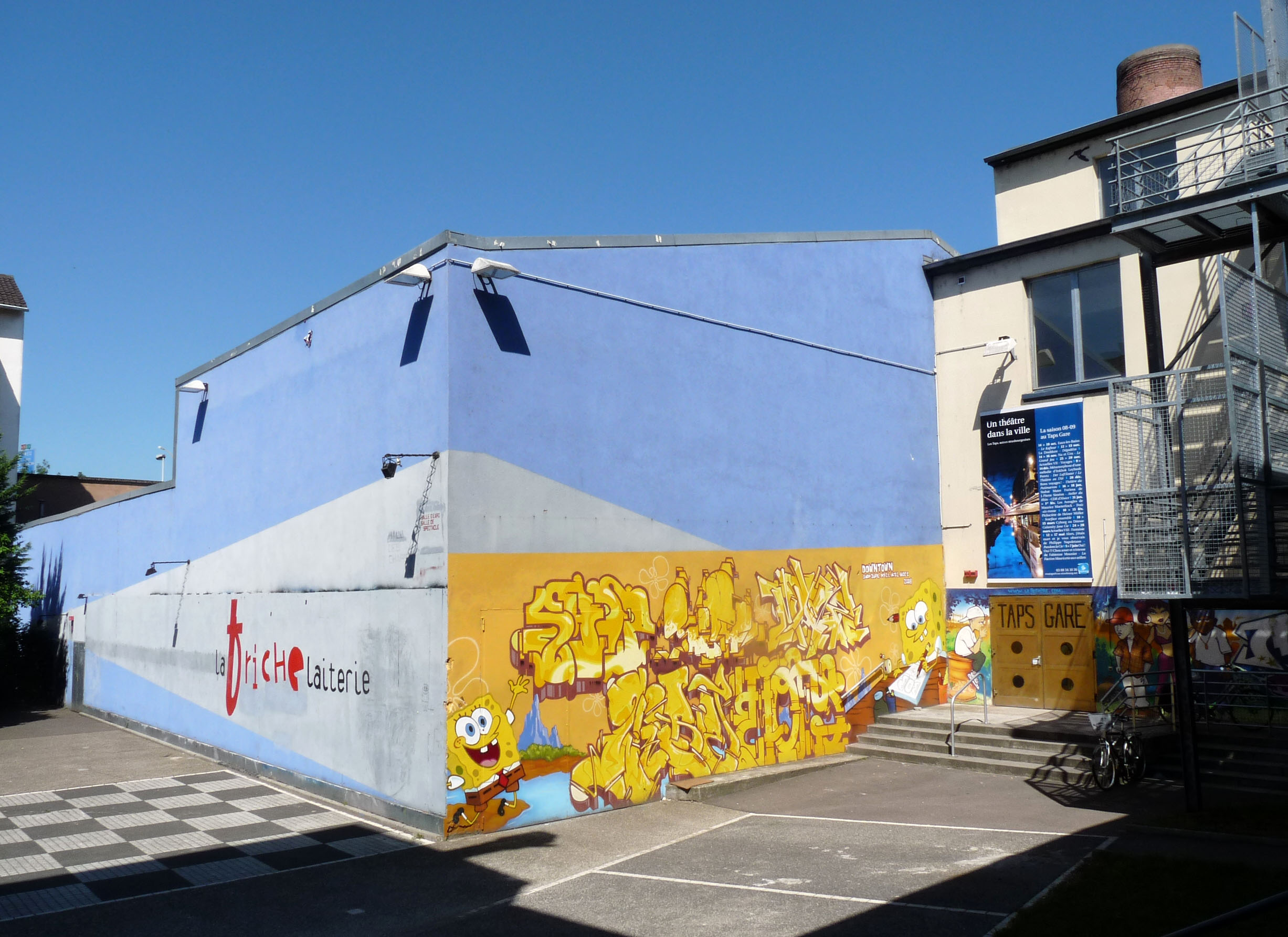 bâtiment culturel Le Hall des Chars à Strasbourg